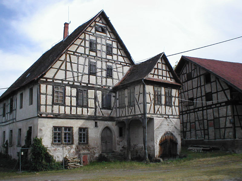 Altes Rentamt (Herrenhof) in Obersulm-Weiler mit Portaldatierung 1558